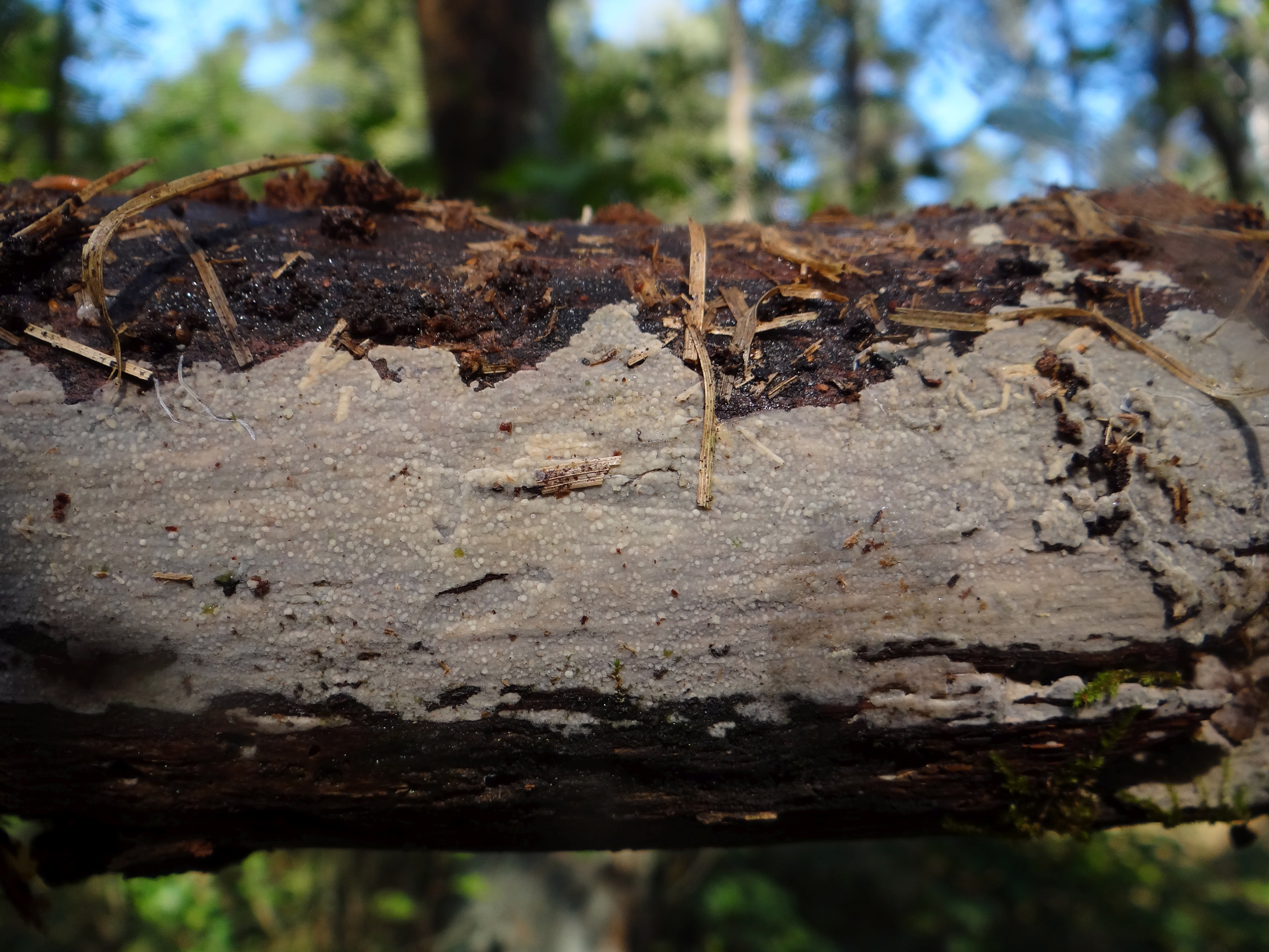 Phlebia lilascens. Location: Slovakia, Słowacki Raj, Przełom Hornadu